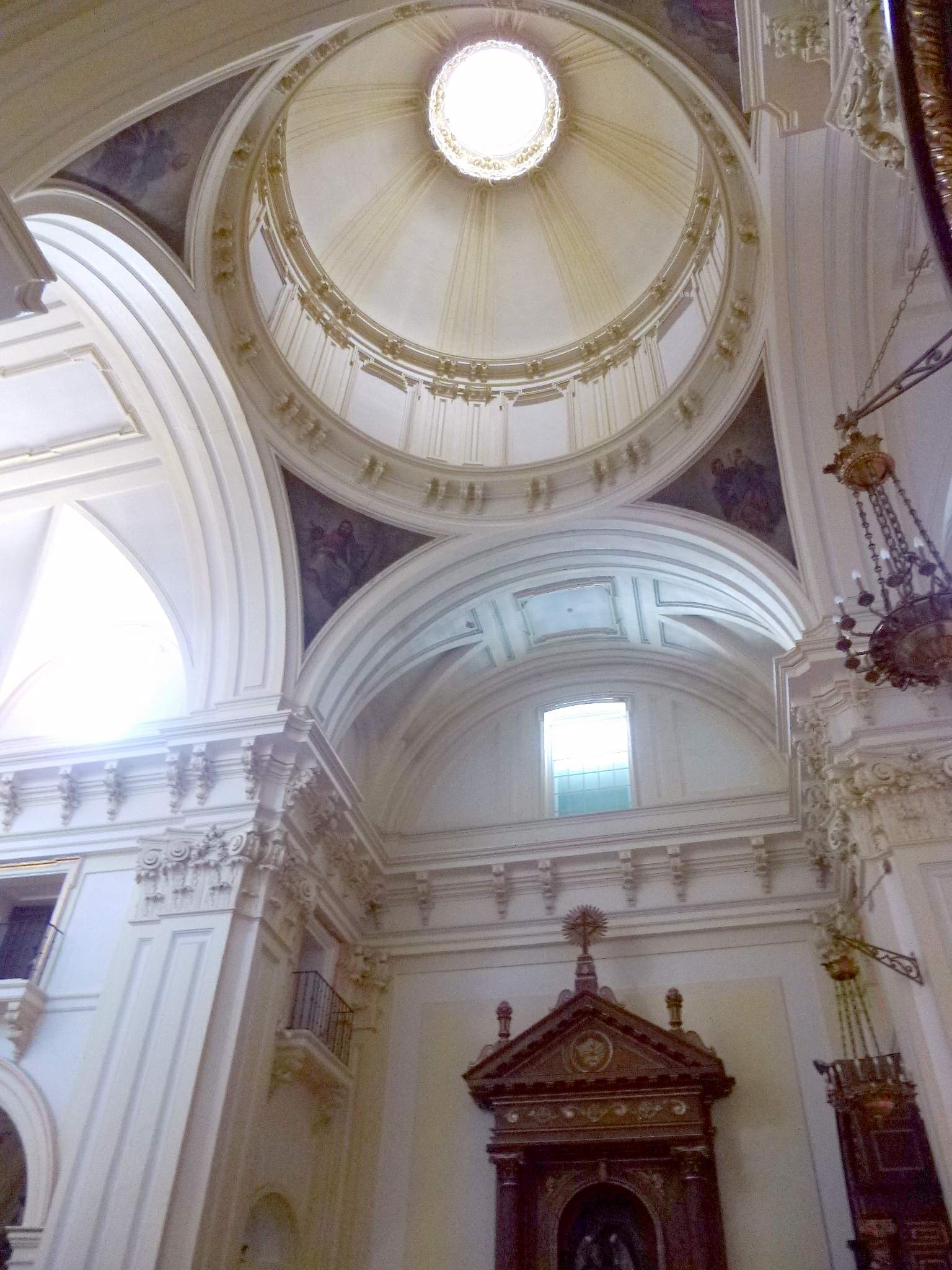 Iglesia de San Martín de Tours, en Madrid.